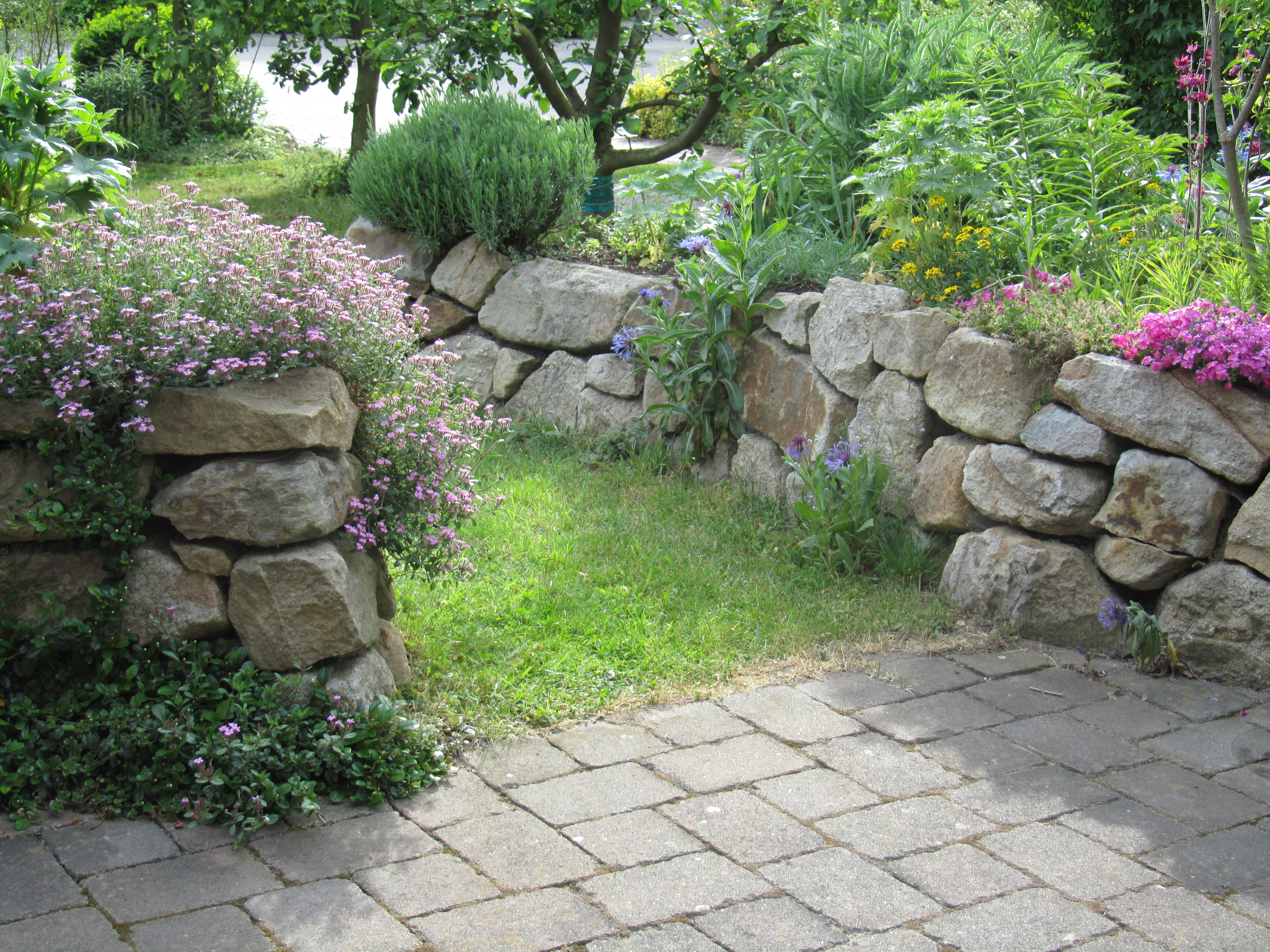 Trockenmauer als Gestaltungselement im Gartenbau. Ziergarten eines Einfamilienhauses.